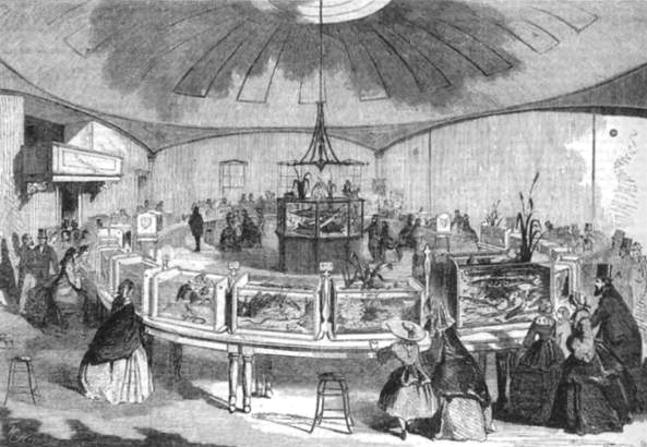 Aquarial Gardens, Boston, Mass.